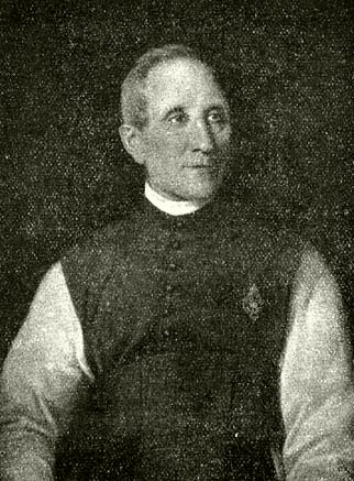 Szvorényi József (1816–1892) nyelvész, irodalomtörténész, pedagógus, a Magyar Tudományos Akadémia levelező, majd tiszteleti tagja. Kovács Mihály festménye